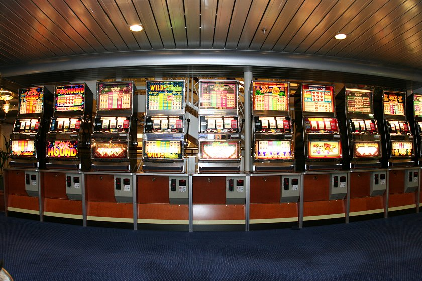 Einarmige Banditen auf der norwegischen Fähre "Kronprinz Harald"